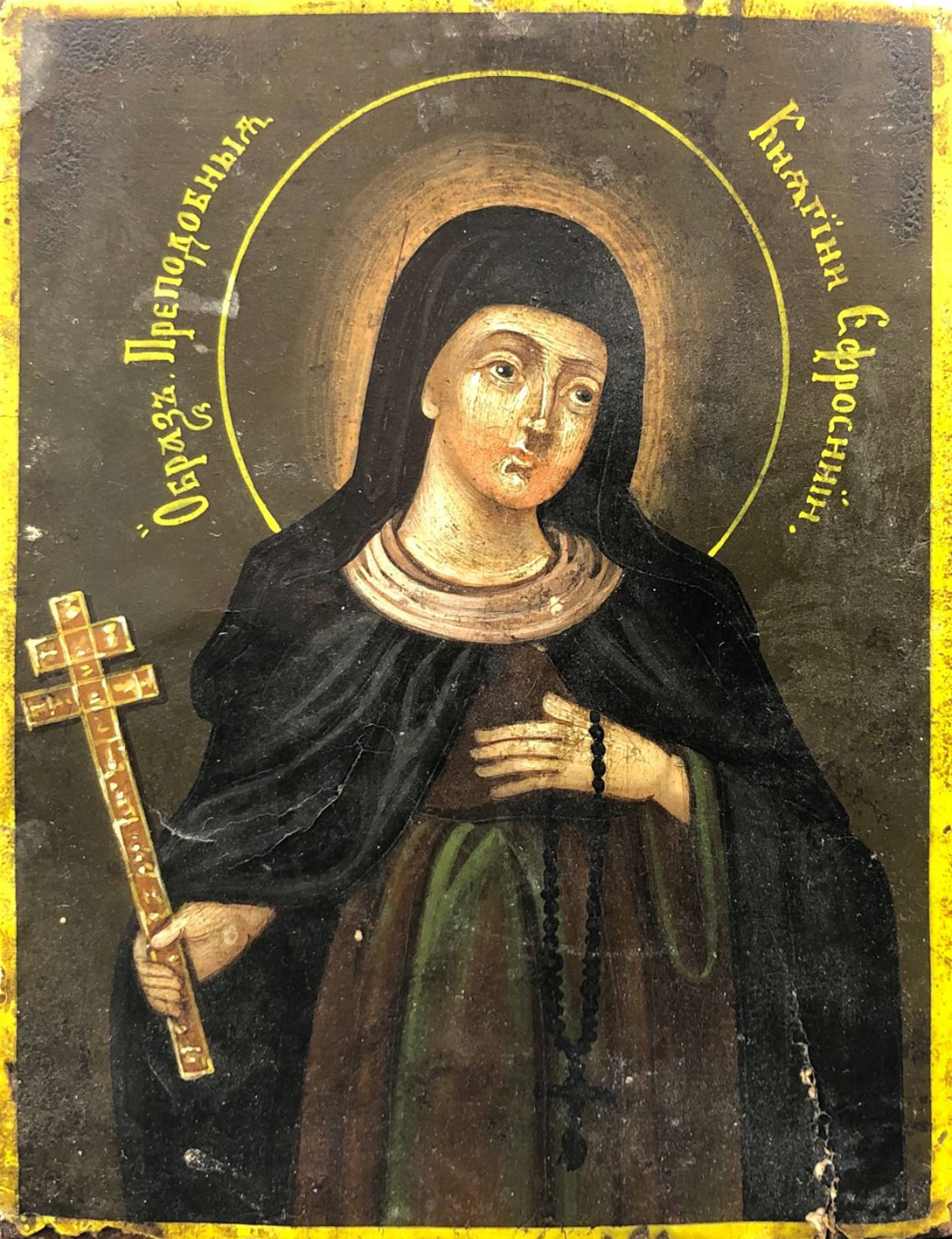 Беларуская (тарашкевіца): Абраз Эўфрасіньні Полацкай (Eŭfrasińnia Połackaja)